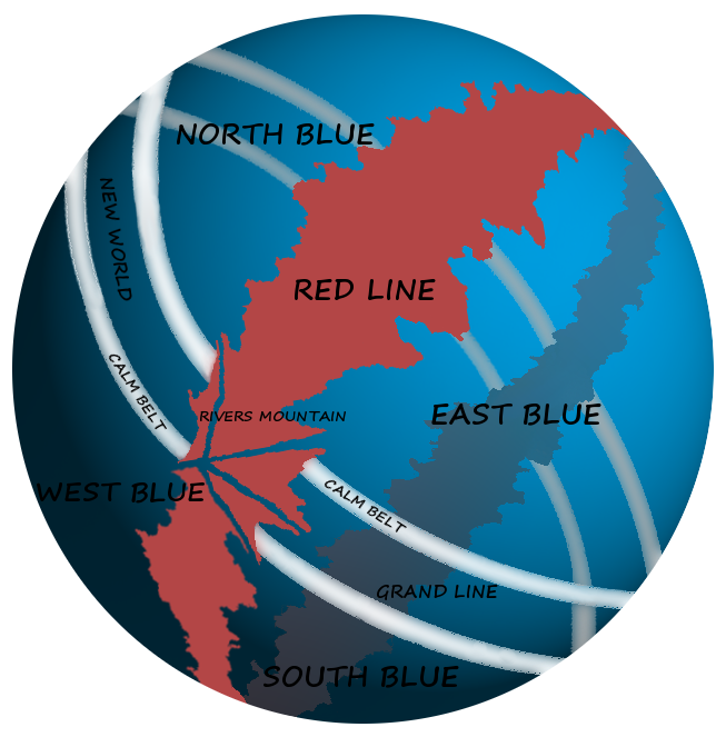 Darstellung der One-Piece Welt